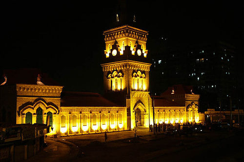 Empress Market Saddar